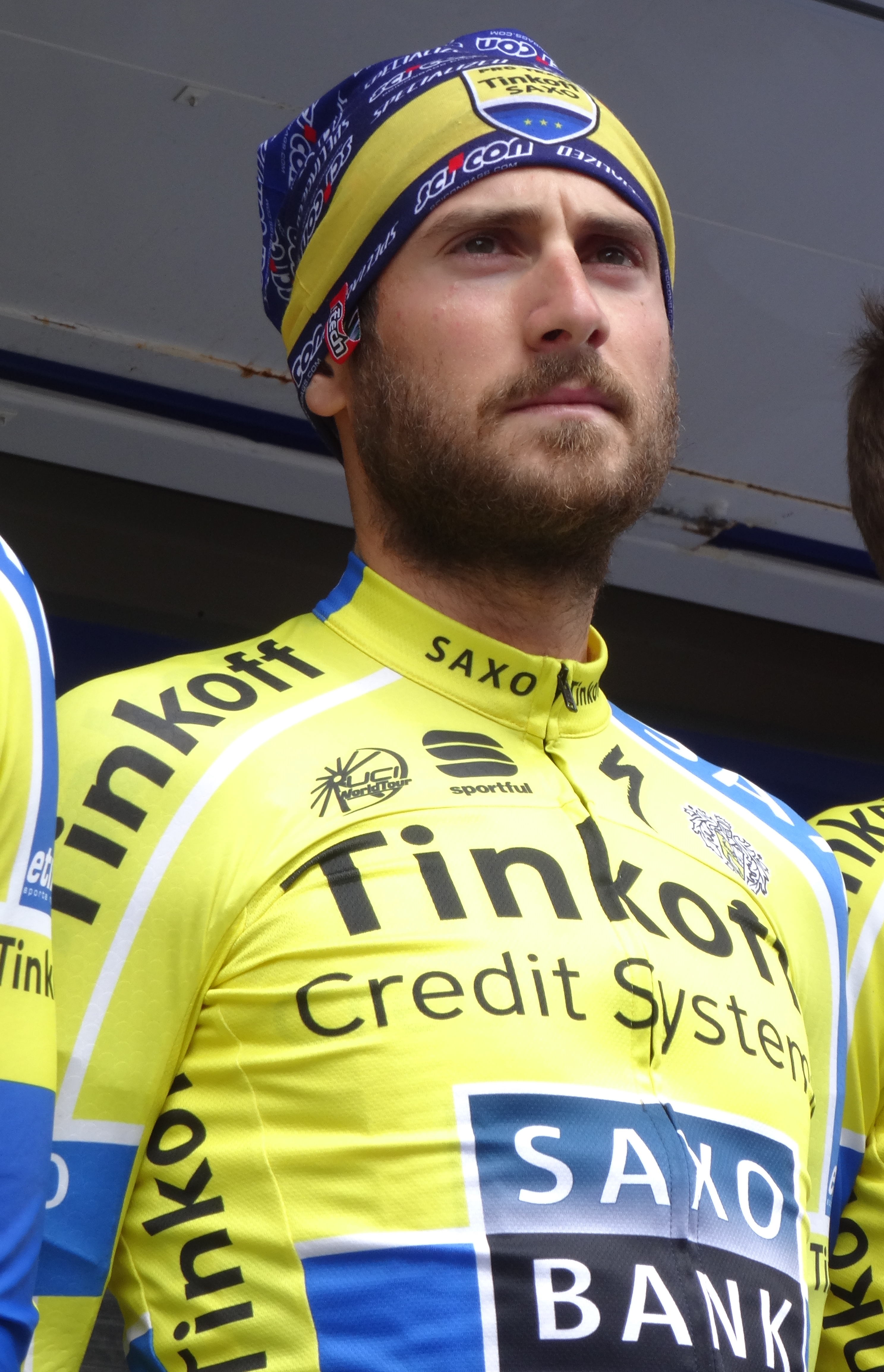 Reportage photographique réalisé le mercredi 7 mai 2014 au départ de la première étape de l'édition 2014 des Quatre jours de Dunkerque à Dunkerque, Nord, Nord-Pas-de-Calais, France. Depicted person: Manuele Boaro Depicted team: Tinkoff-Saxo